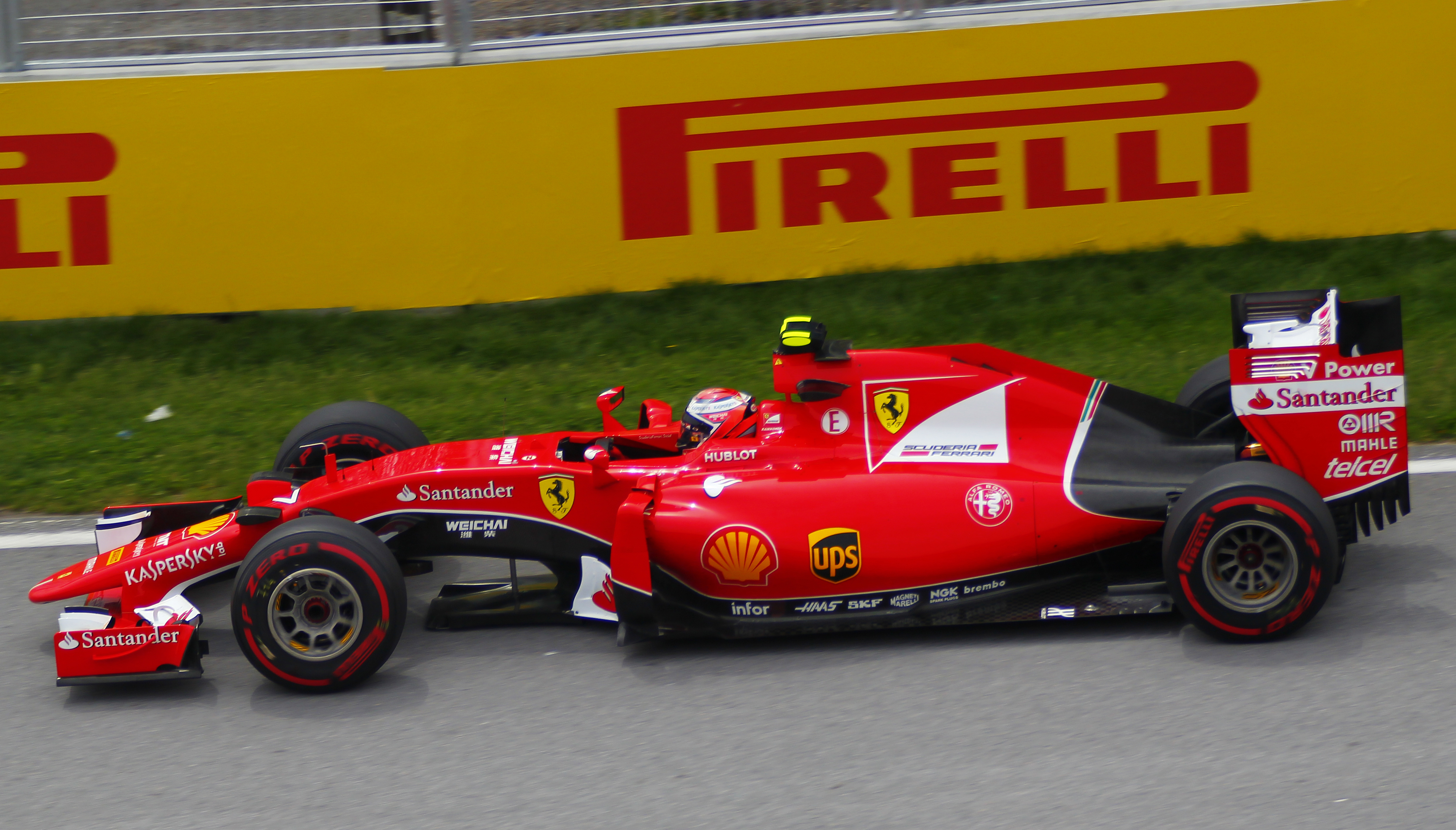 Kimi Raïkkönen - Scuderia Ferrari - Grand Prix du Canada - Circuit Gilles-Villeneuve - 7 juin 2015 (Photo Paul-Émile Poulin-Jacques)